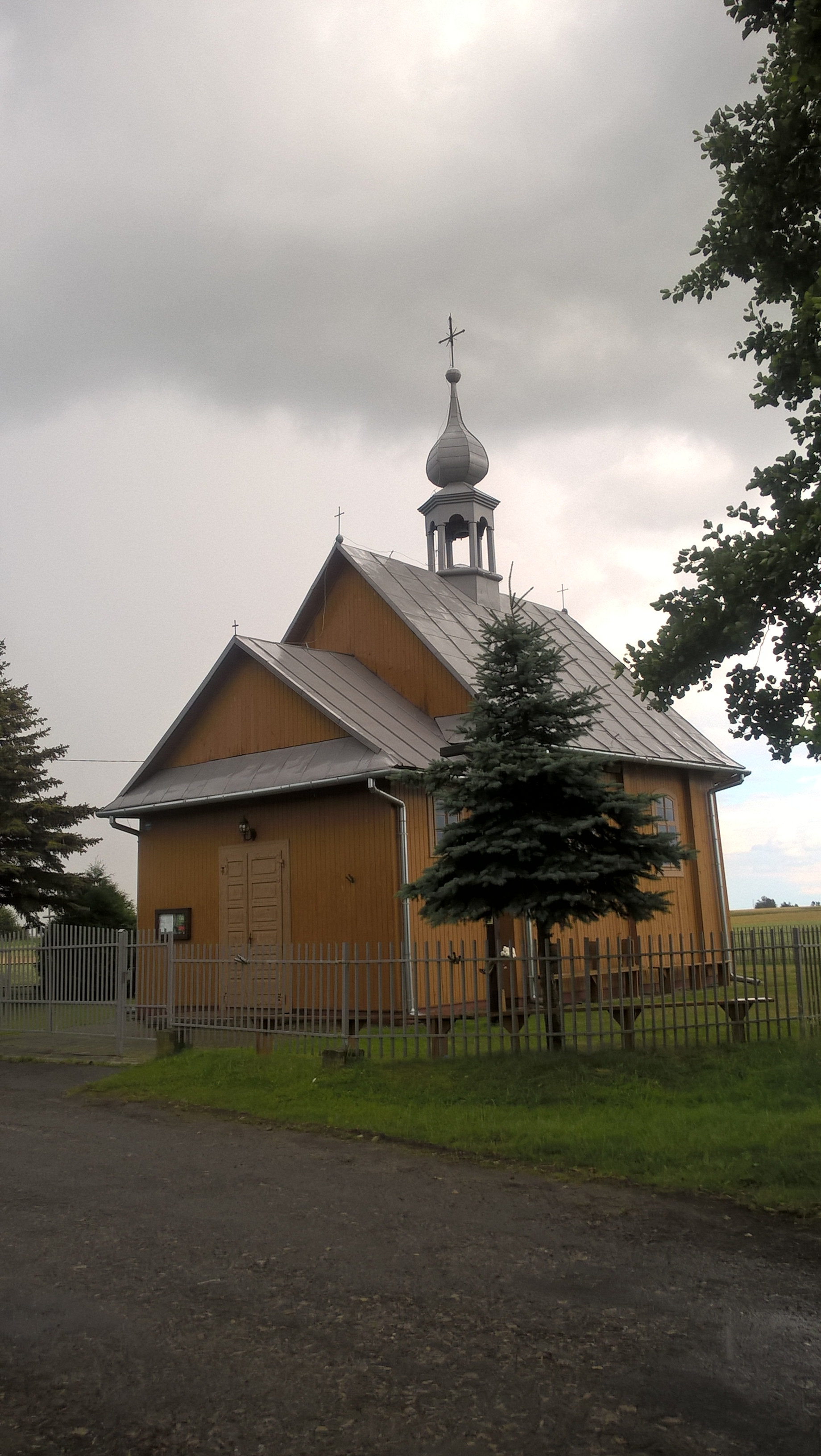 Kaplica w Jastrzębcu